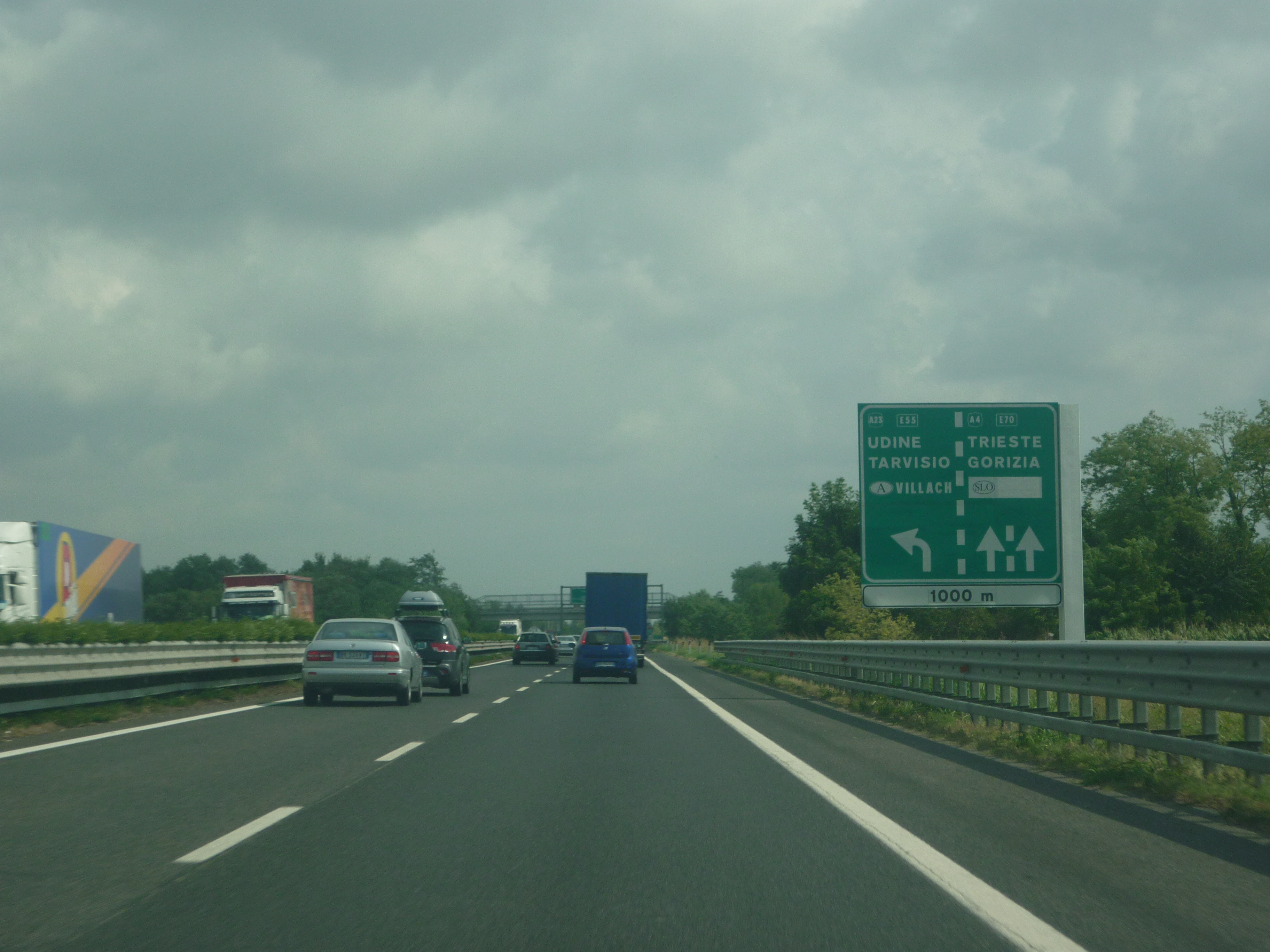 a23